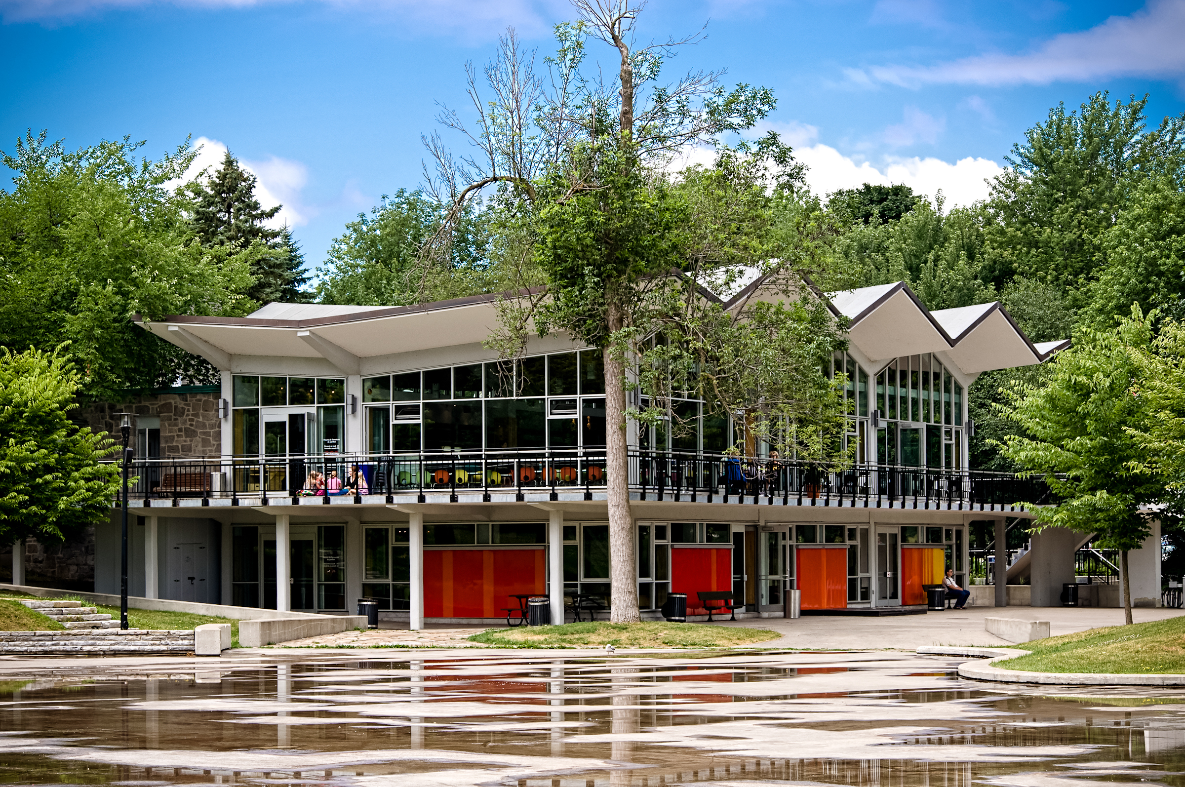 Arrondissement historique et naturel du Mont-Royal, , (Canada). (Protection AH décrétéAN décrété. Voir la liste des lieux patrimoniaux de Montréal pour plus de détails).